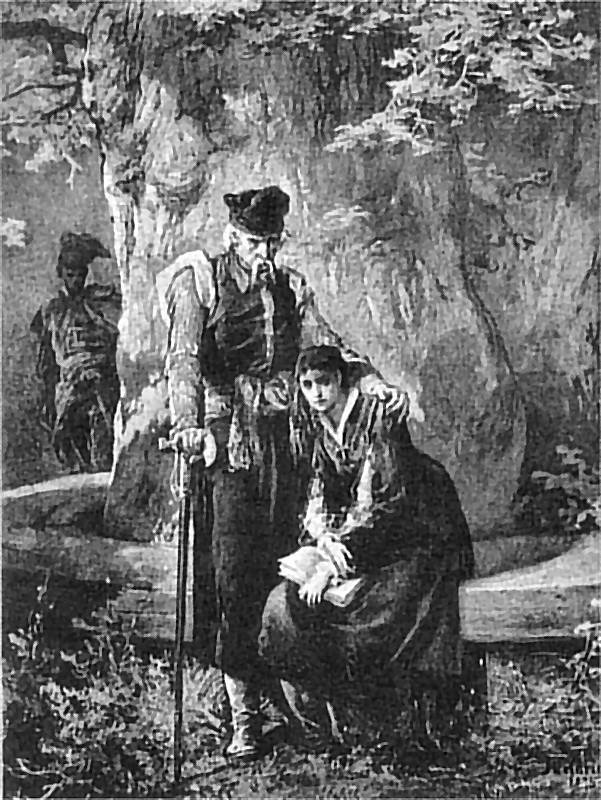 Michał Elwiro Andriolli